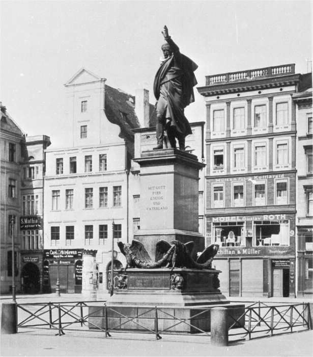 Denkmal für Gebhard Leberecht von Blücher auf dem Blücherplatz (vorher Salzring) in Breslau